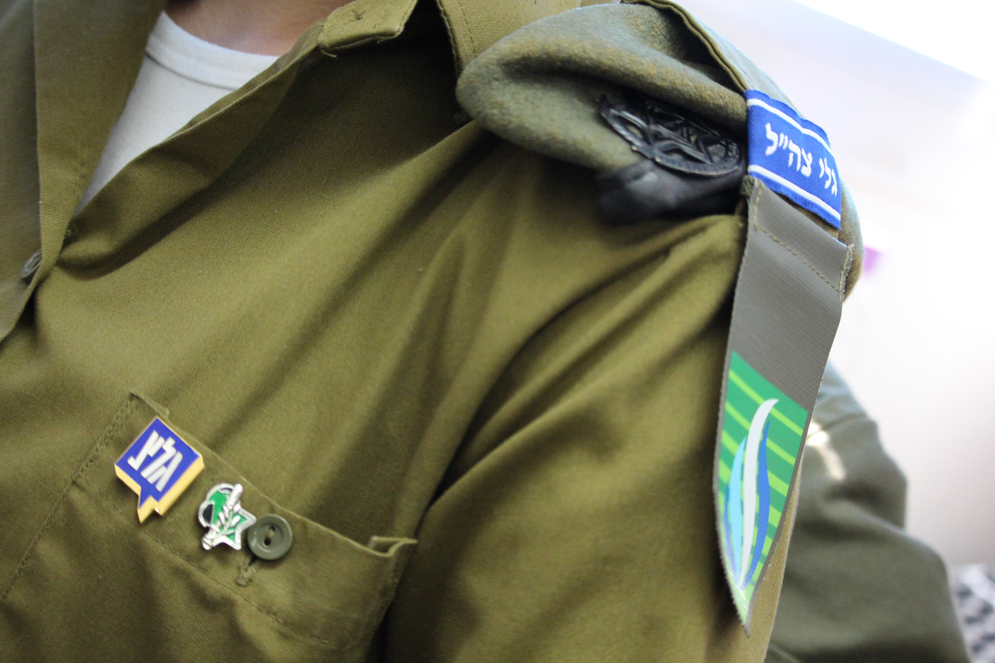 על הכותפת, תגית גלי צה"ל ותג היחידה של חיל החינוך. על כיס החולצה, סיכת גלי צה"ל ולידה סיכת קורס העיתונאים של גלי צה"ל.